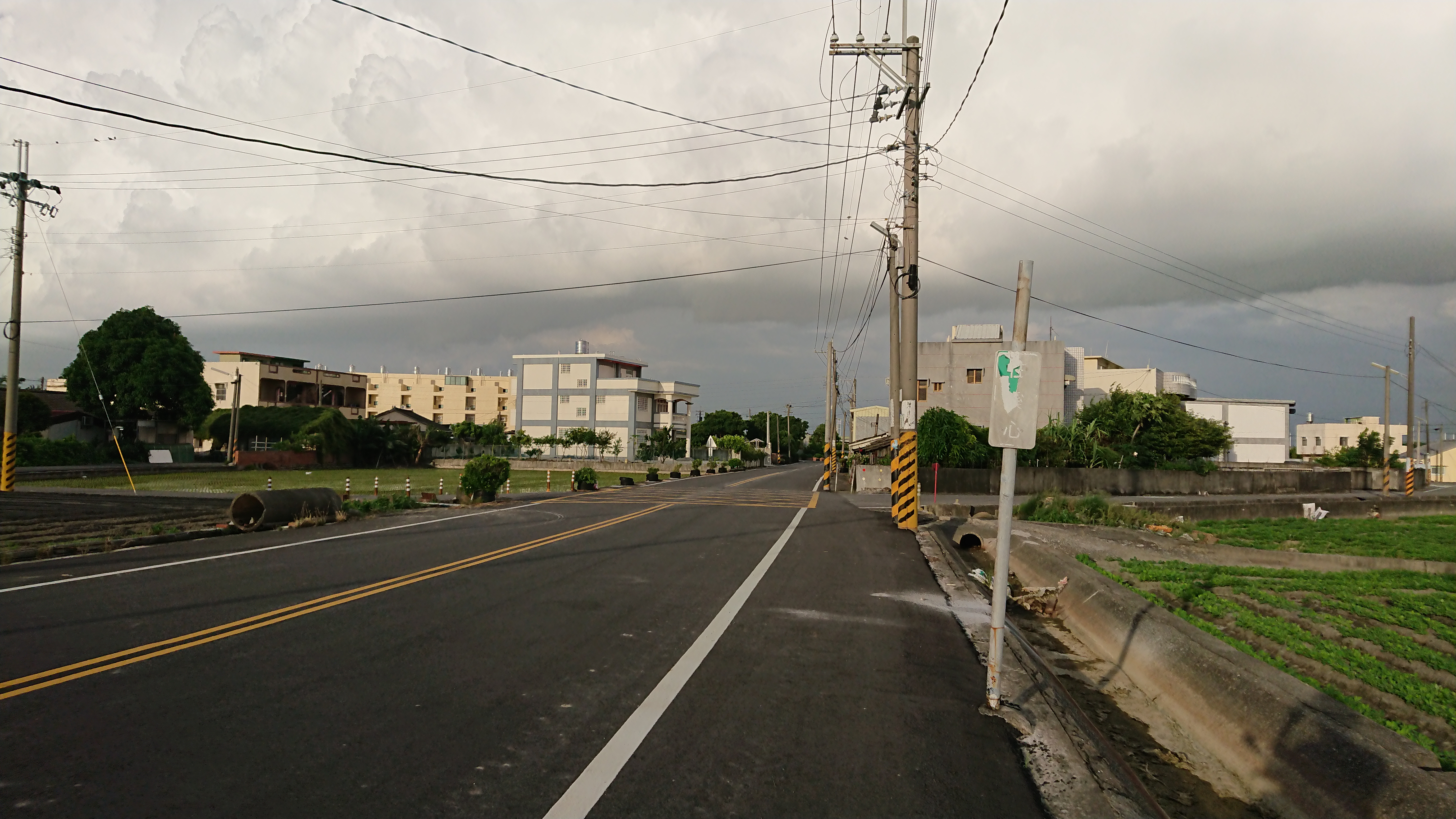 中文（台灣）: 非標準制式的下溪心地名牌，前方聚落即是下溪心